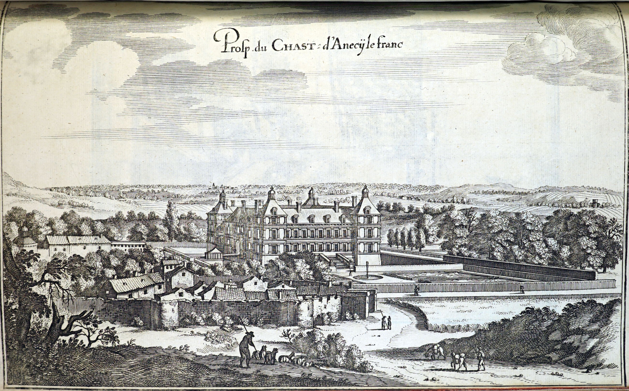 dessin extrait du livre.